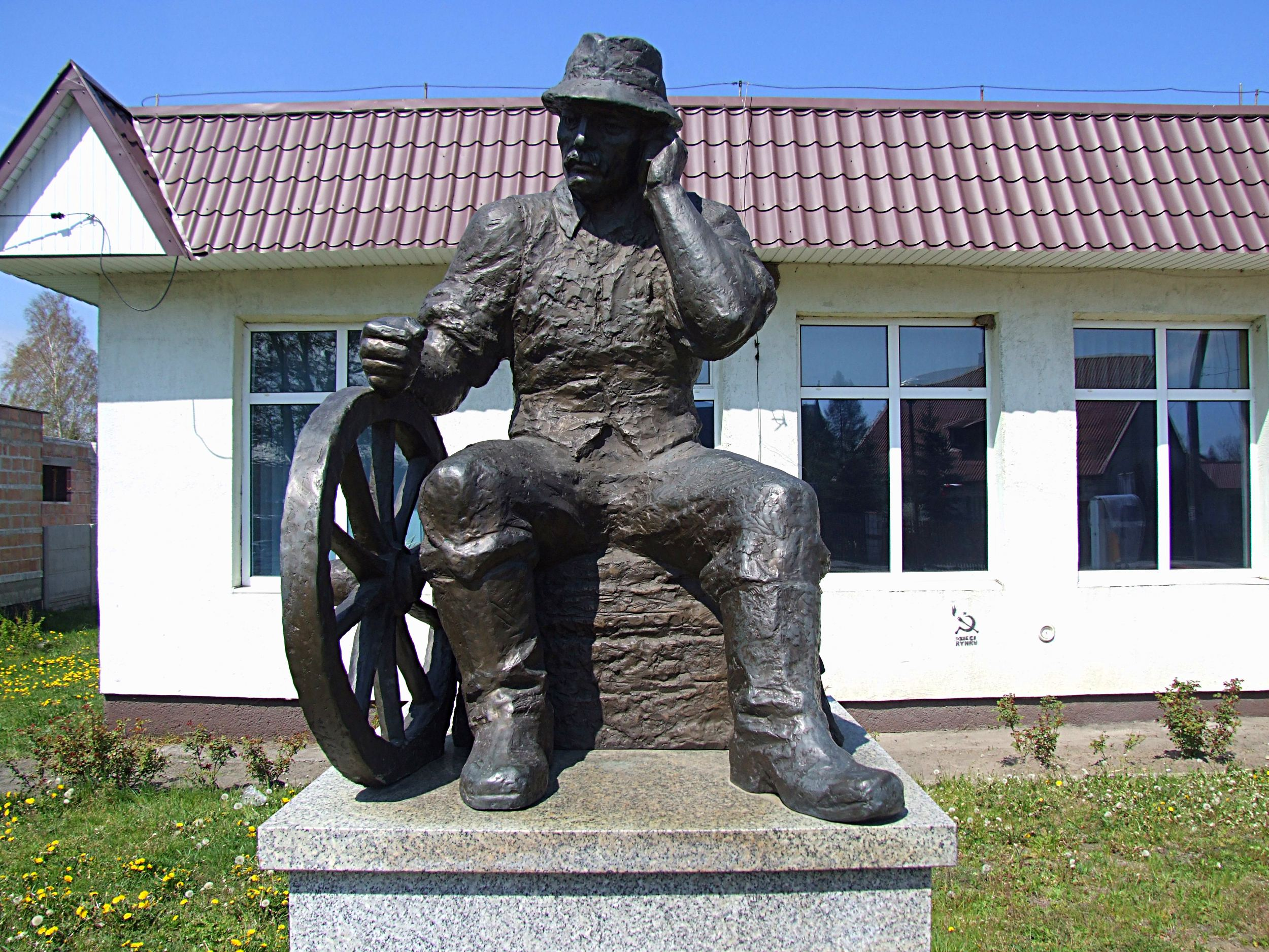 Wąchock – pomnik sołtysa.